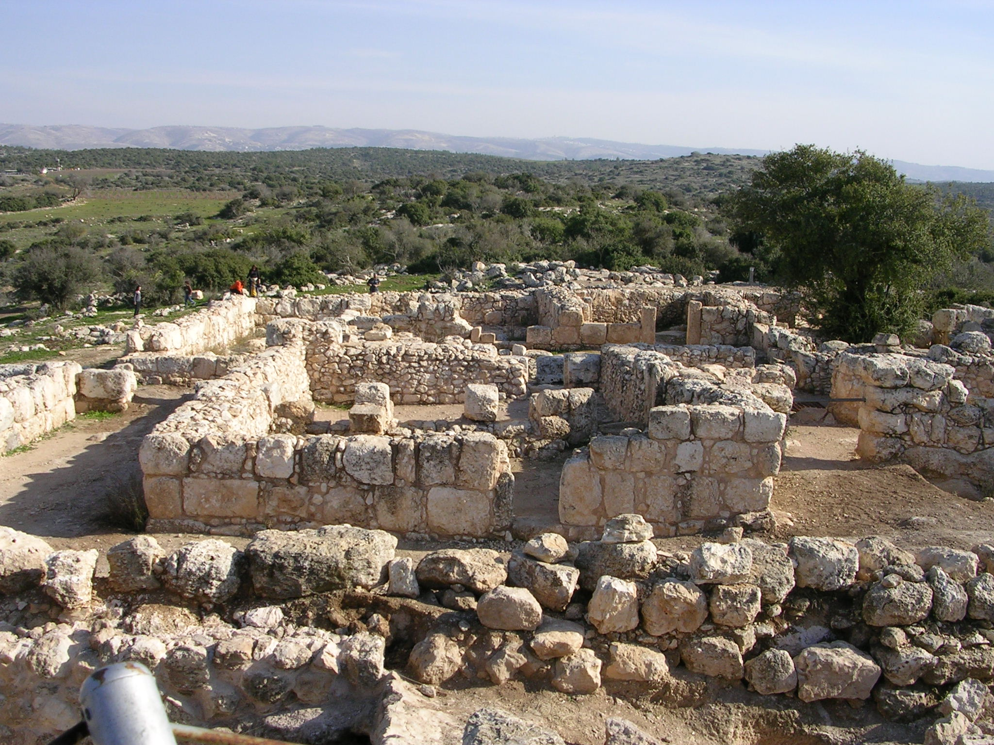 Archaeological site in Israel חרבת עתרי